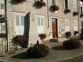 Mairie de Simandre-sur-Suran